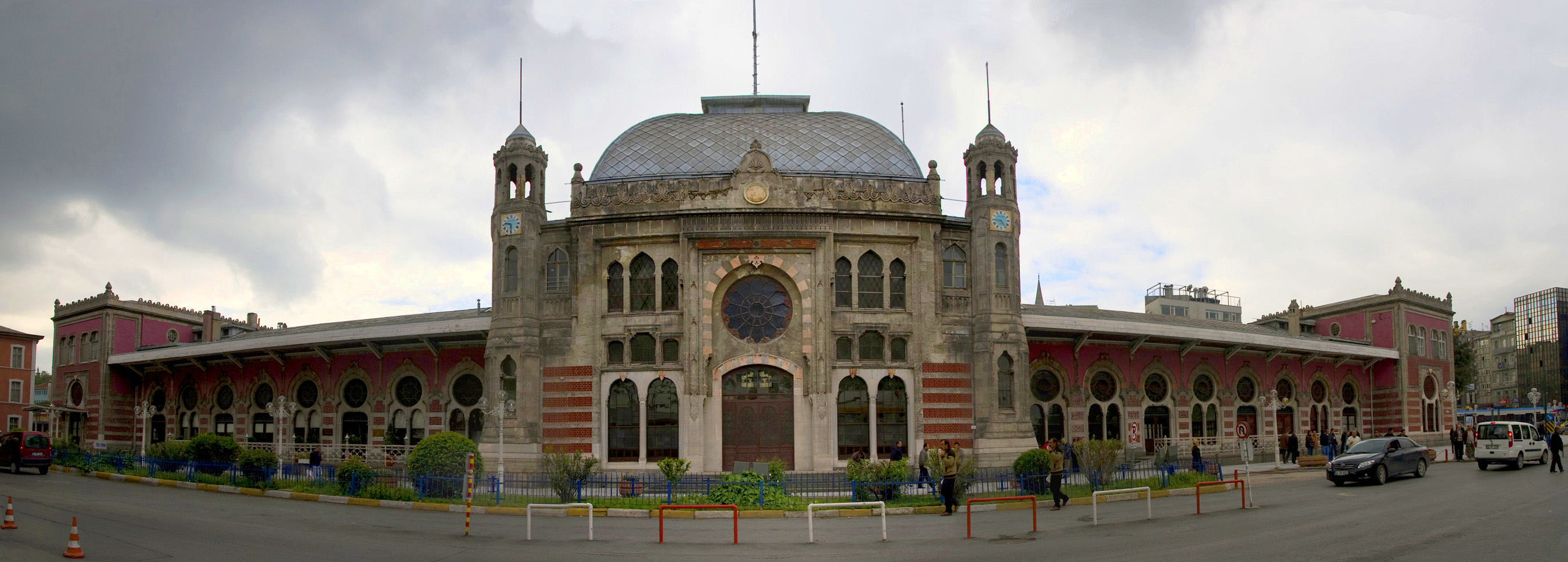 Die Frontansicht des alten Istanbuler Bahnhofs. Das Bild wurde aus drei Einzelbilder zusammengesetzt. Es stellt die alte Front des Bahnhofs dar. Hinter dem alten Gebäude befindet sich der neue Bahnhof. An diesem alten Bahnhof endete die traditionelle Strecke des Orient Express.